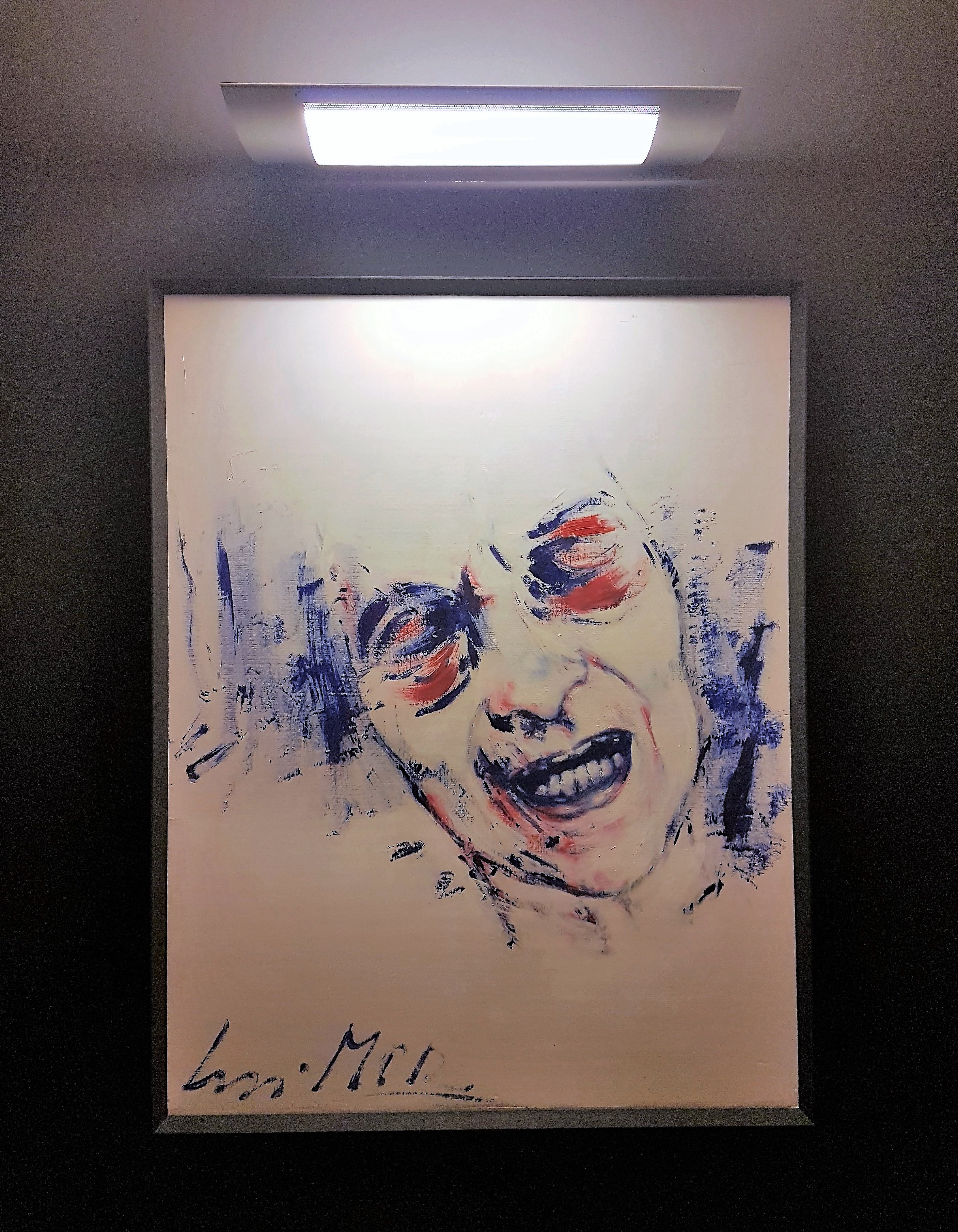 Luigi Mor, "Maria dolente" (Susanna Colussi) da una scena de “Il Vangelo secondo Matteo”, 2000, olio su cartone, cm 140 x 100